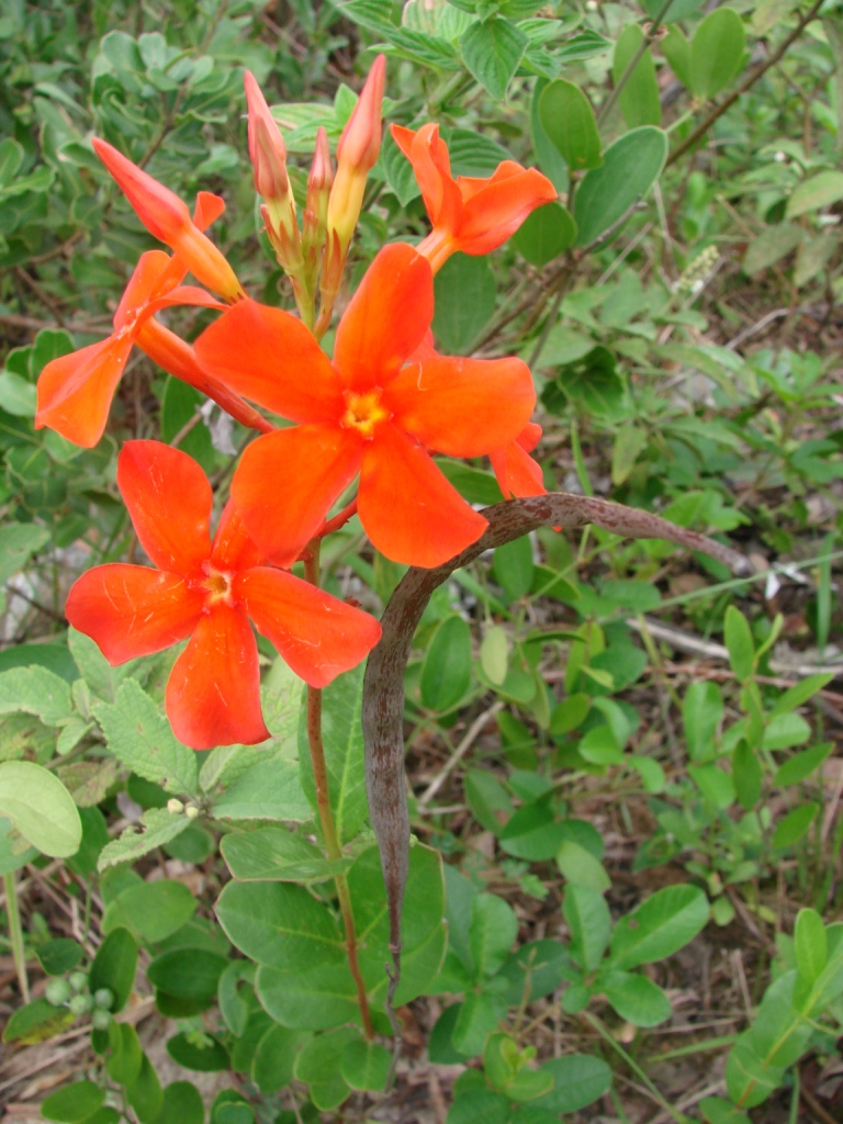 Mandevilla coccinea - APOCYNACEAE - Praia do Sonho - Palho�a - SC - Brasil